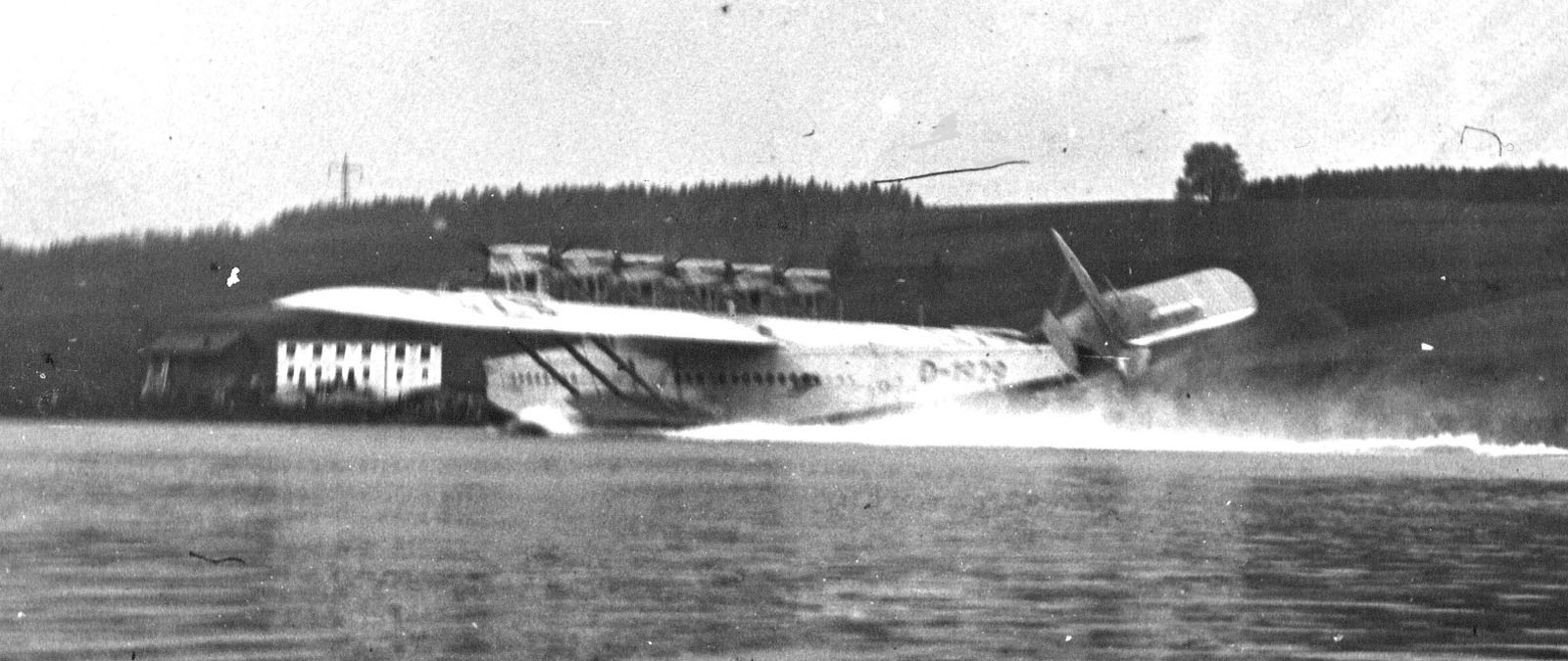 Havarie der DO X 1929 auf dem Passauer Kachletstausee. Am 9.5.1933 sollte die DO X 1929, berühmt für ihren "zweijährigen Weltflug", auf dem Stausee des Passauer Kachletkraftwerks landen, um eine neuerliche Rundreise anzutreten. Der Flugkapitän Horst Merz setzte jedoch bei der Landung zu steil an und das Leitwerk brach ab. Diese Panne wurde allerdings der Öffentlichkeit verschwiegen. Das Bild wurde aus Zufall geschossen. Die Havarie bedeutete das Ende der Karriere als Passagierflugboot der DO X, von denen es ohnehin nur drei gegeben hatte.